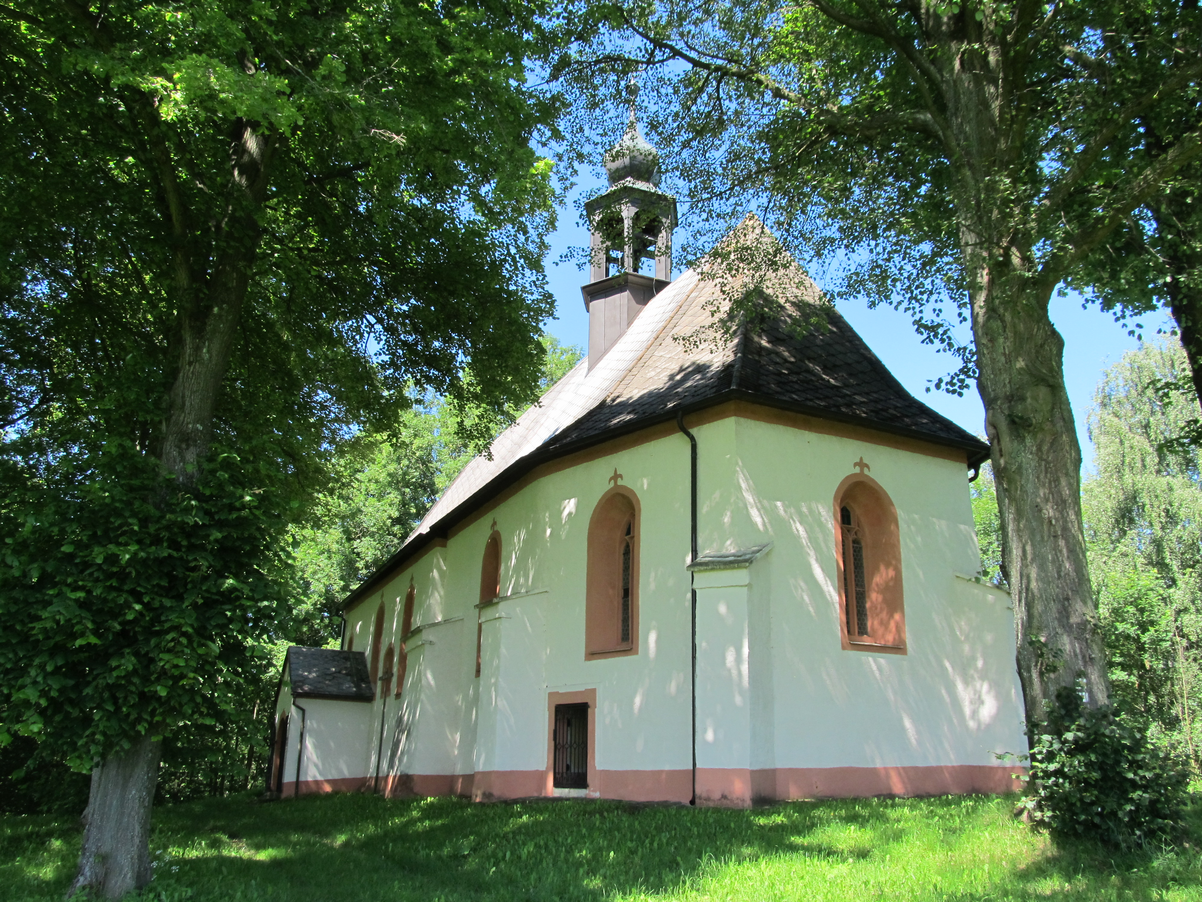 Uhliště - kostel sv. Linharta